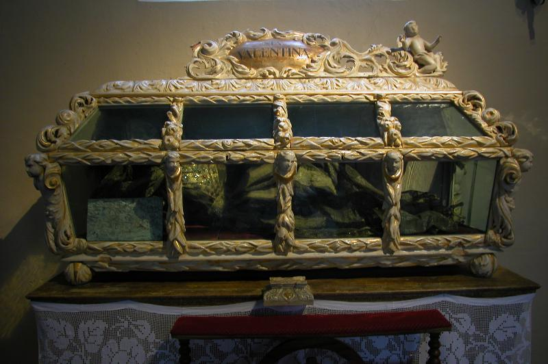 Die sterblichen Überreste der Heiligen Valentina wurden vom Papst Katharina Eleonora Gräfin Lamberg zum Geschenk gemacht und 1702 nach Drosendorf gebracht, wo sie zunächst in der Schlosskapelle ausgestellt wurde. 1704 wurde sie in die Stadtkirche von Drosendorf (Niederösterreich) gebracht.